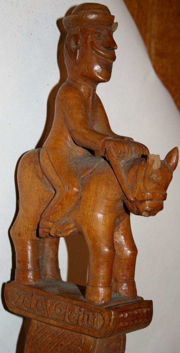 Vrh gusli koje je izradio Marko Jukić u Zelovu kod Sinja. U Muzeju grada Šibenika nalaze se od 1947. godine.